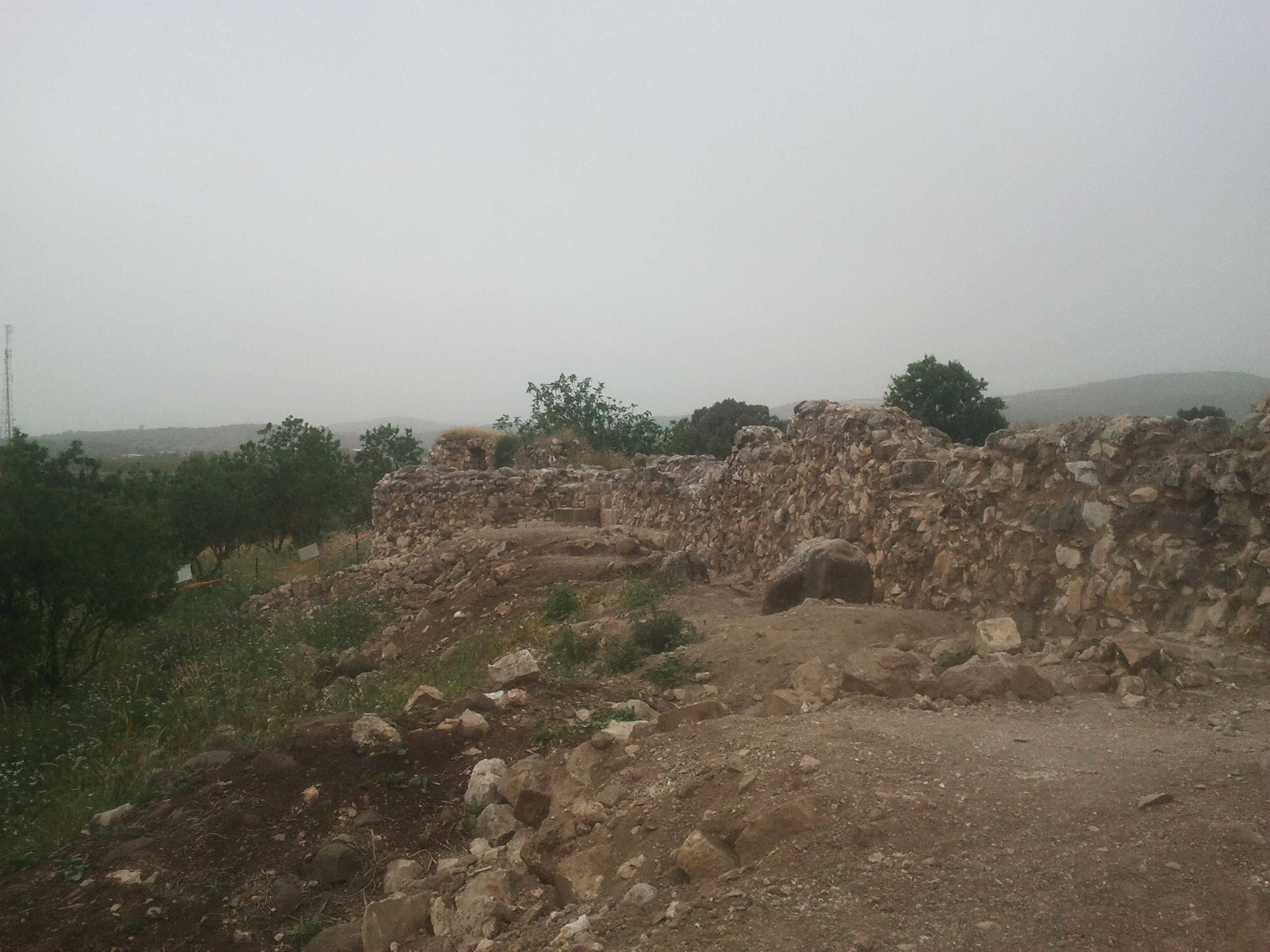 חנוֹת תגרים (חאן אל תוג'אר) - שרידי חאן (אכסניה) ממלוכי גדול, בגליל התחתון, מול הכניסה לקיבוץ בית קשת, על נתיב דרך הדואר הקדומה. החאן היה בנוי סביב חצר מרכזית ובה באר. החאן כלל מסגד מפואר ממנו נותרו שרידי שלושה צריחים. מכלול החאן מוקף חומה שייתכן שהיא מאוחרת, רק מן המאה ה-16. שמו של החאן מעיד על השוק שהתקיים סביבו (תגרנים = סוחרים).